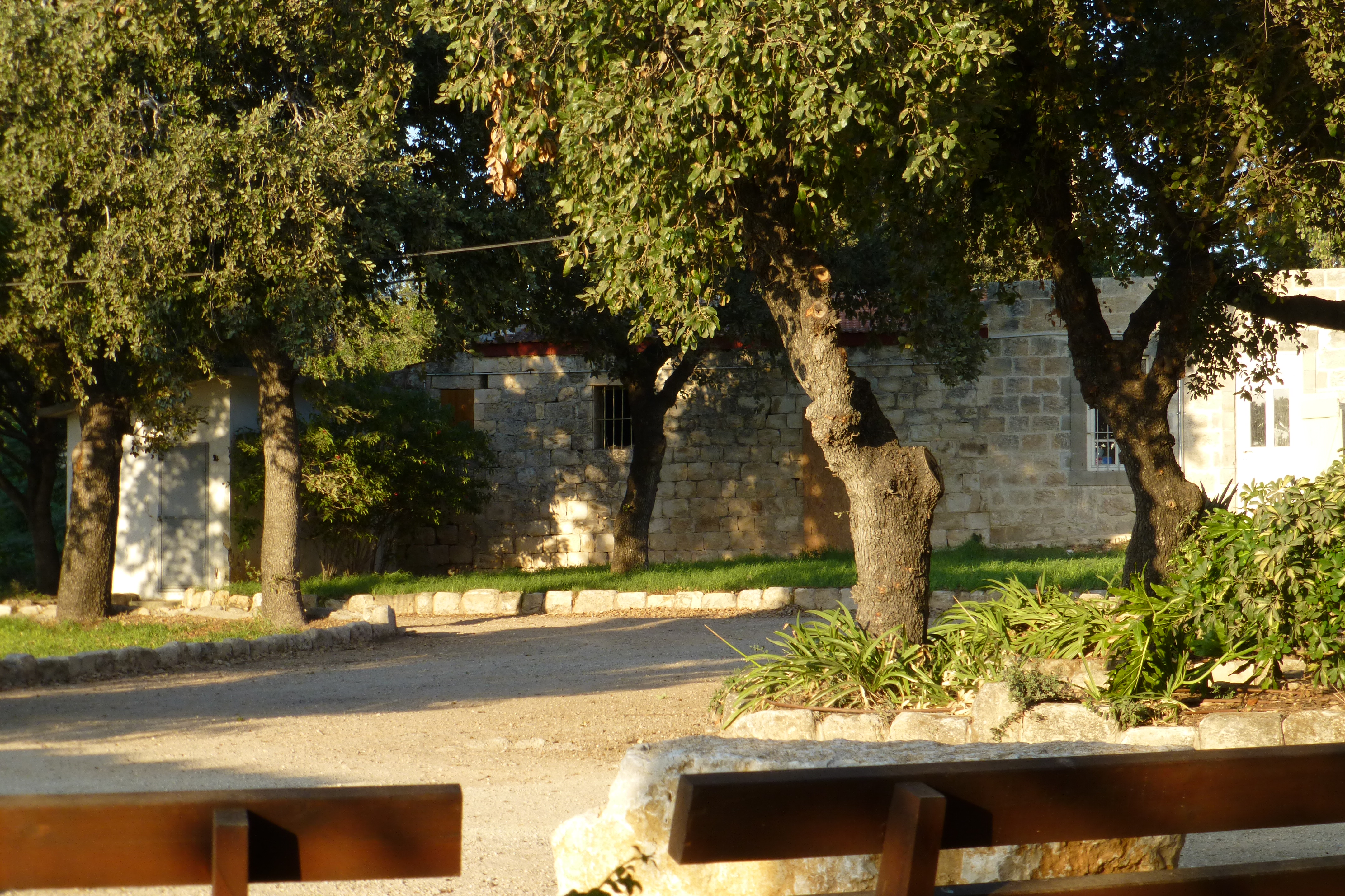 היישוב המודרני הראשון באיזור בית לחם הגלילית הוקם על ידי הטמפלרים ב-1906.